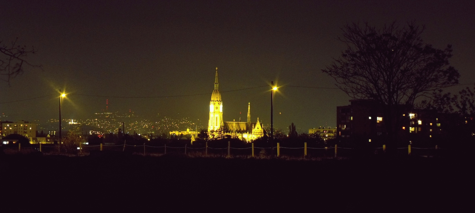 Kilátás Kőbányán, a régi sörgyári területektől (Budapest, X. ker.)